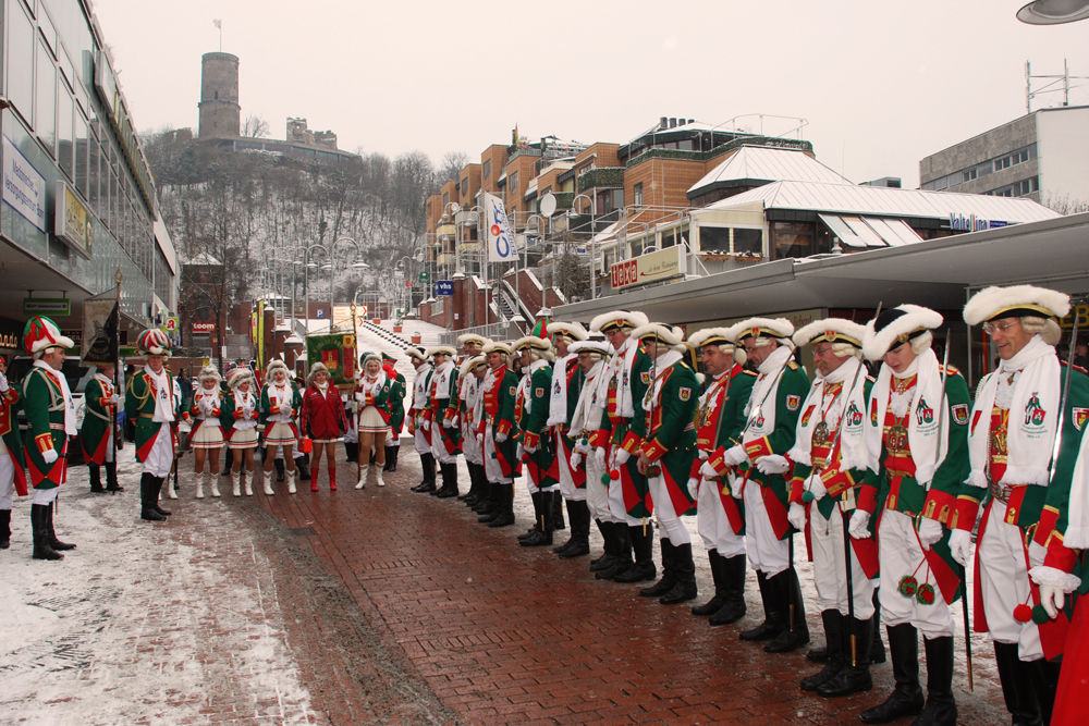 An Weiberfastnacht führen die Stadtsoldaten in der Innenstadt von Bad Godesberg Soldatentänze vor